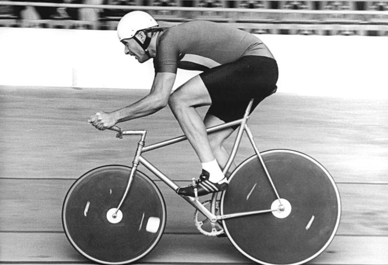 Bernd Dittert ADN-ZB Weisflog 9.7.88 Cottbus: DDR-Meisterschaften im Bahnradsport - DDR-Meister in 4 000-Meter-Einzelverfolgungsfahren wurde Bernd Dittert vom SC Dynamo Berlin.